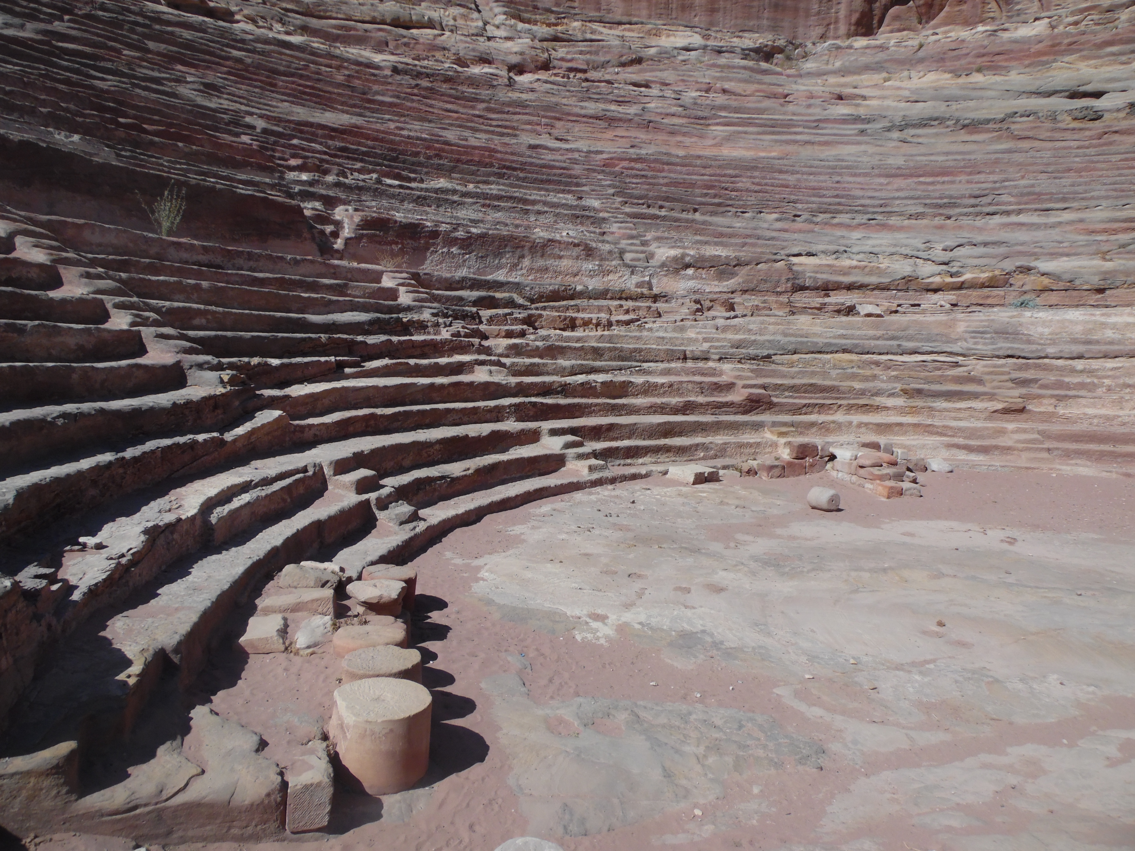 Vista del teatro esculpido en la roca